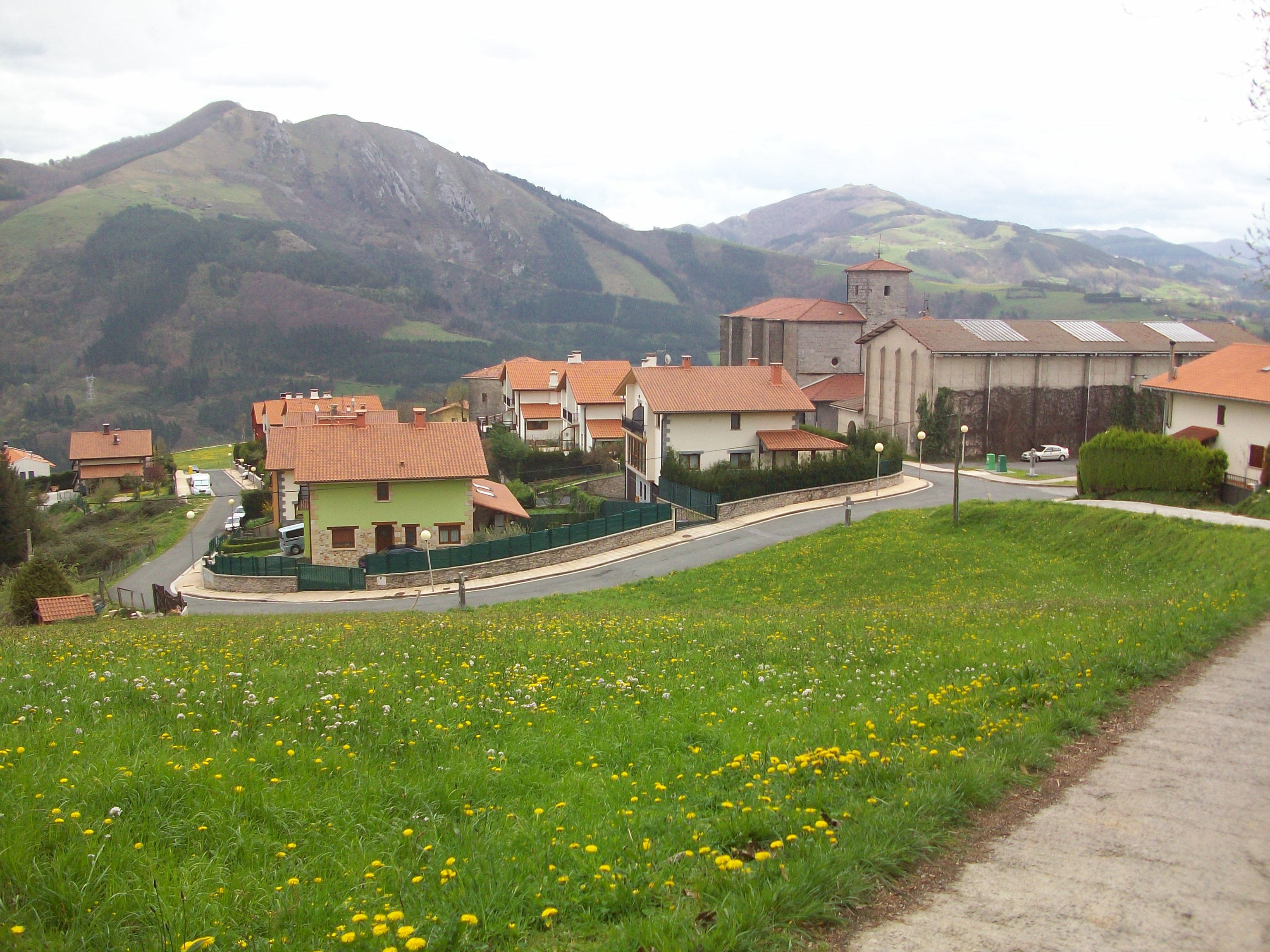 Hernialde, Tolosaldea. Gipuzkoa, Euskal Herria. Hernialde, Tolosaldea. Guipuscoa, Basque Country.